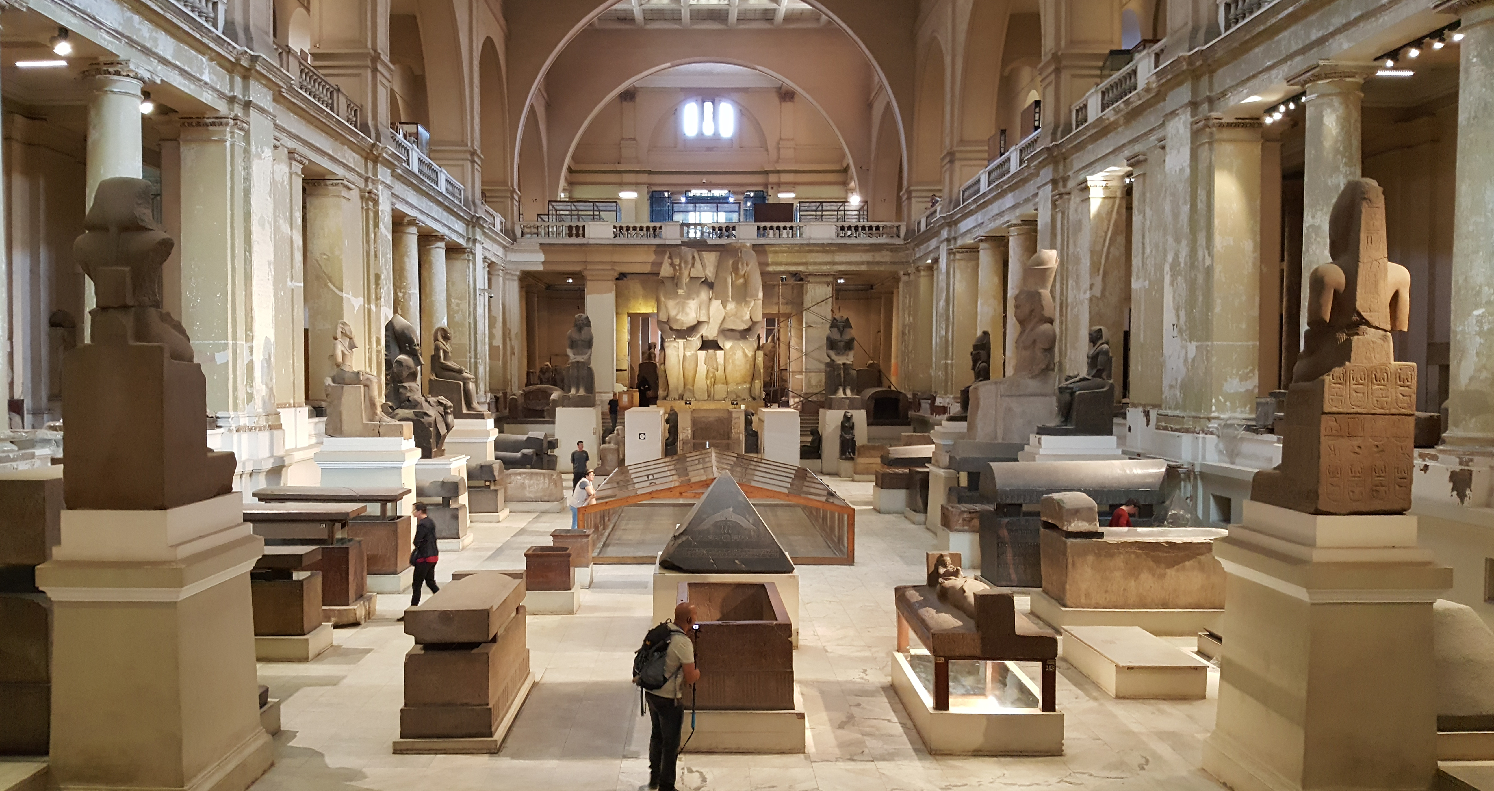 המוזיאון בקהיר